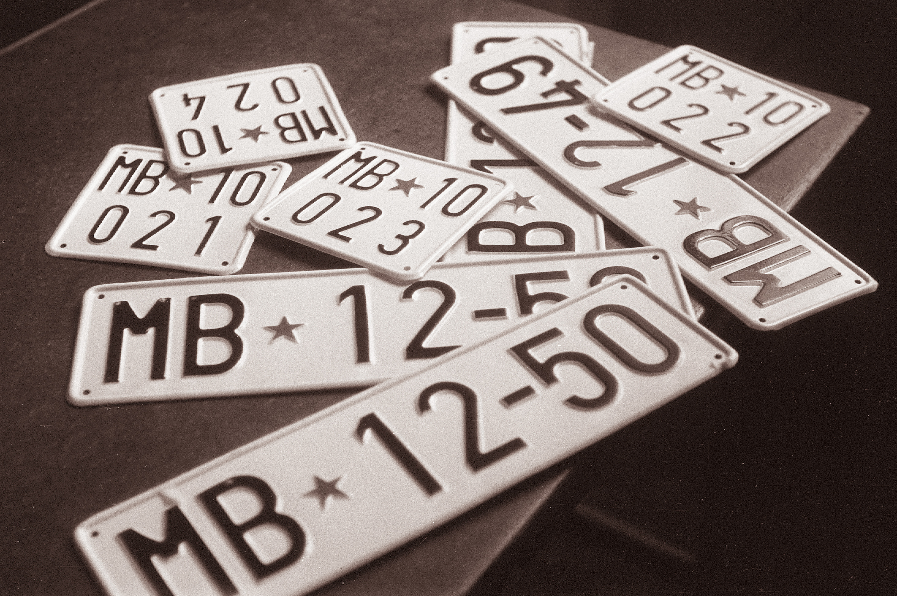 Registrske tablice